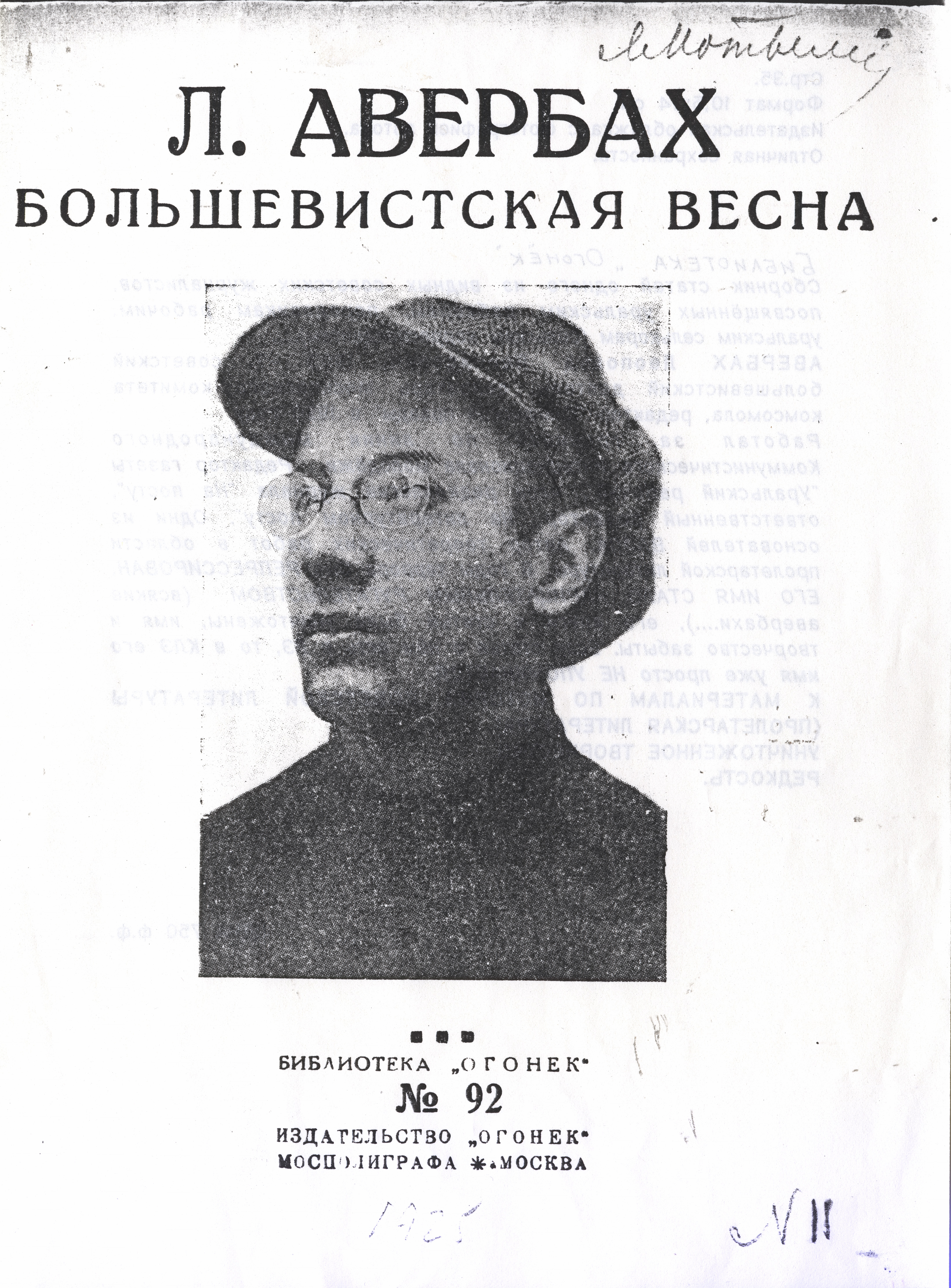 Авербах, Леопольд Леонидович (1903—1937) — советский литературный критик, член Союза писателей СССР